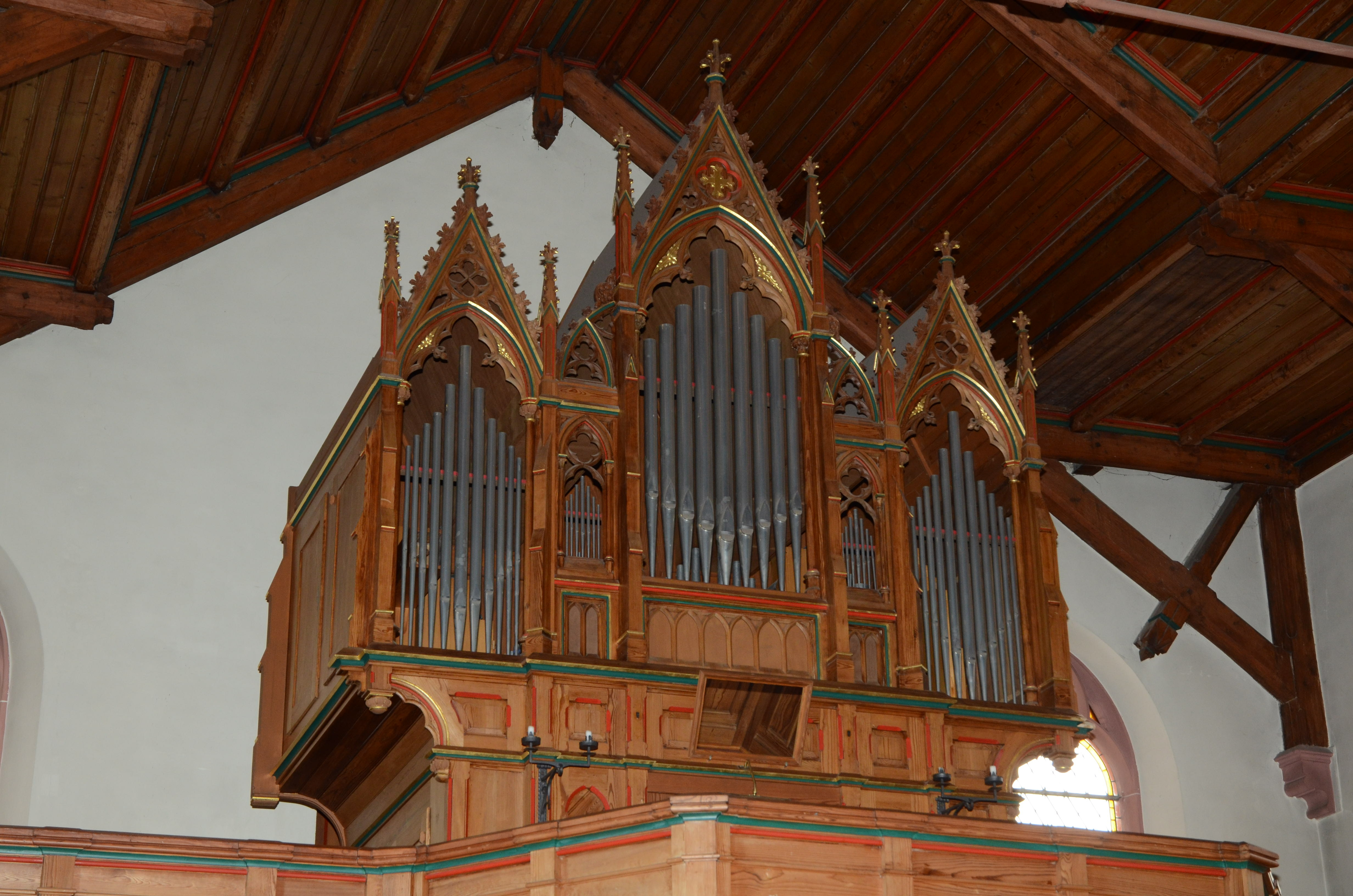 evang.-luth. Kirche in Eichfeld, Orgel